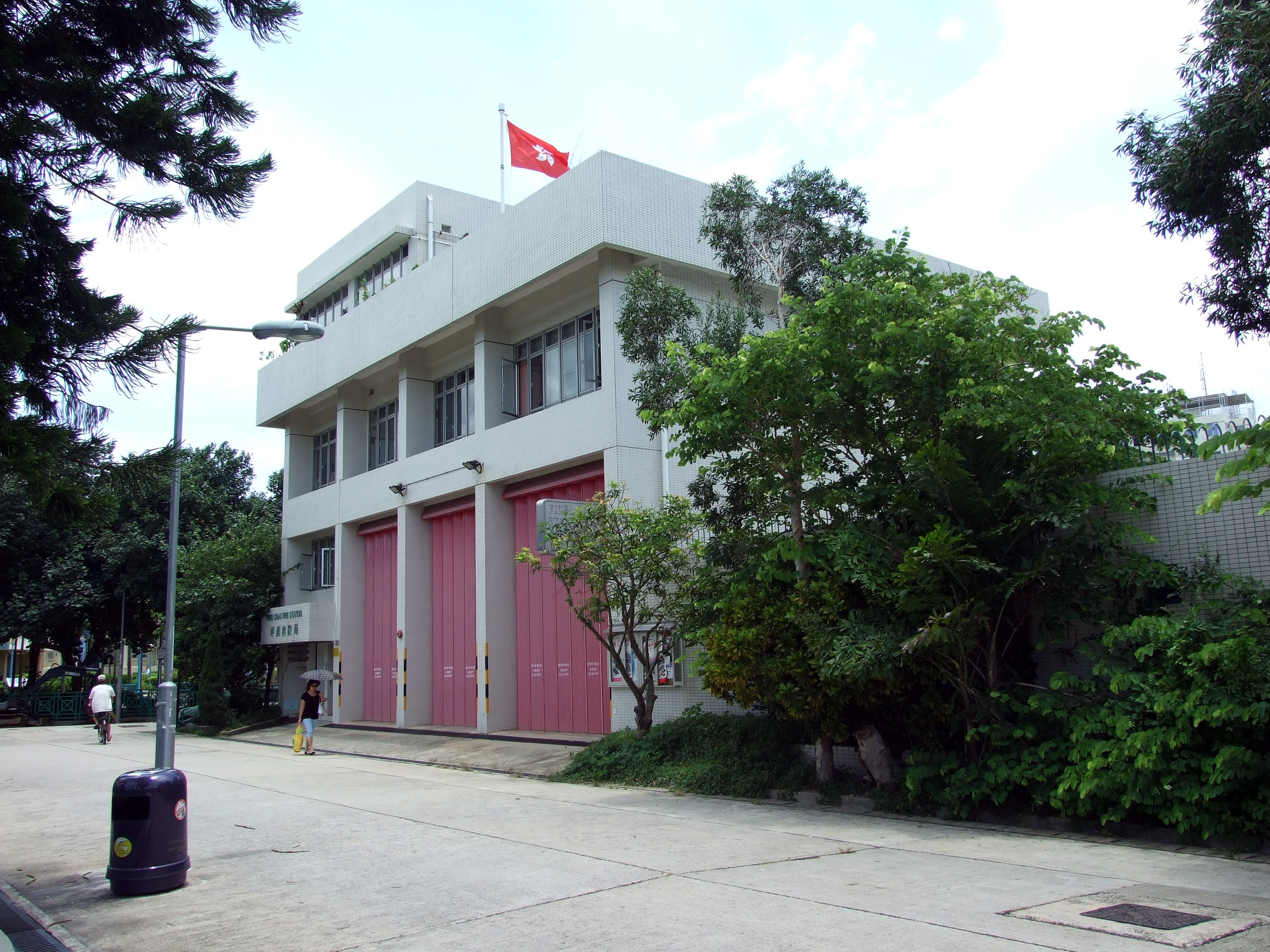 中文（香港）: 坪洲消防局